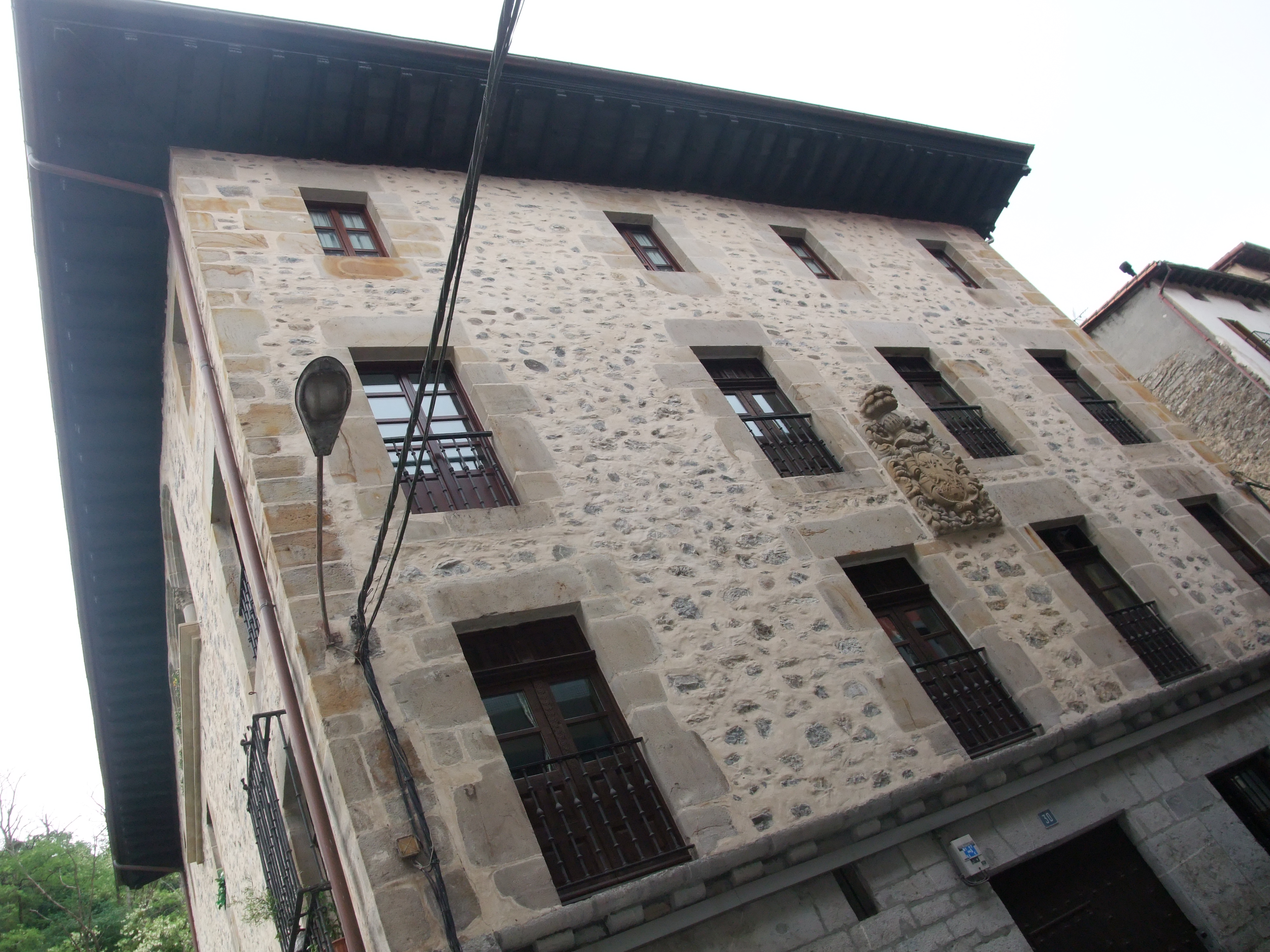 Vergara (Guipúzcoa)-Casa Zuloaga-Bereterio-1